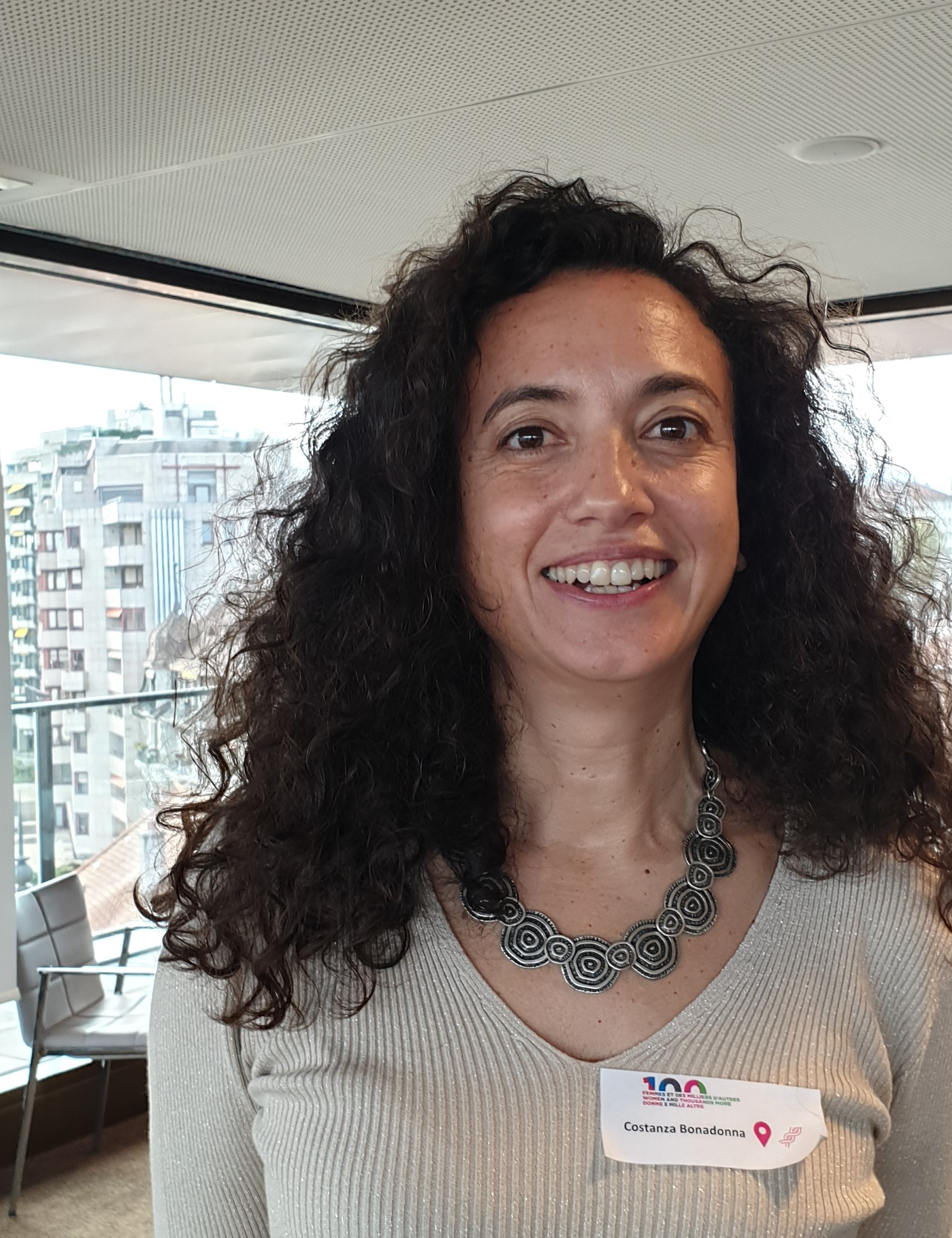 Dans le cadre de la nomination de 100 femmes organisé par les universités de Suisse Romande et de Bourgogne Franche Comté, remise des prix aux lauréates le 8 novembre 2019 à Genève - 100femmes.ch